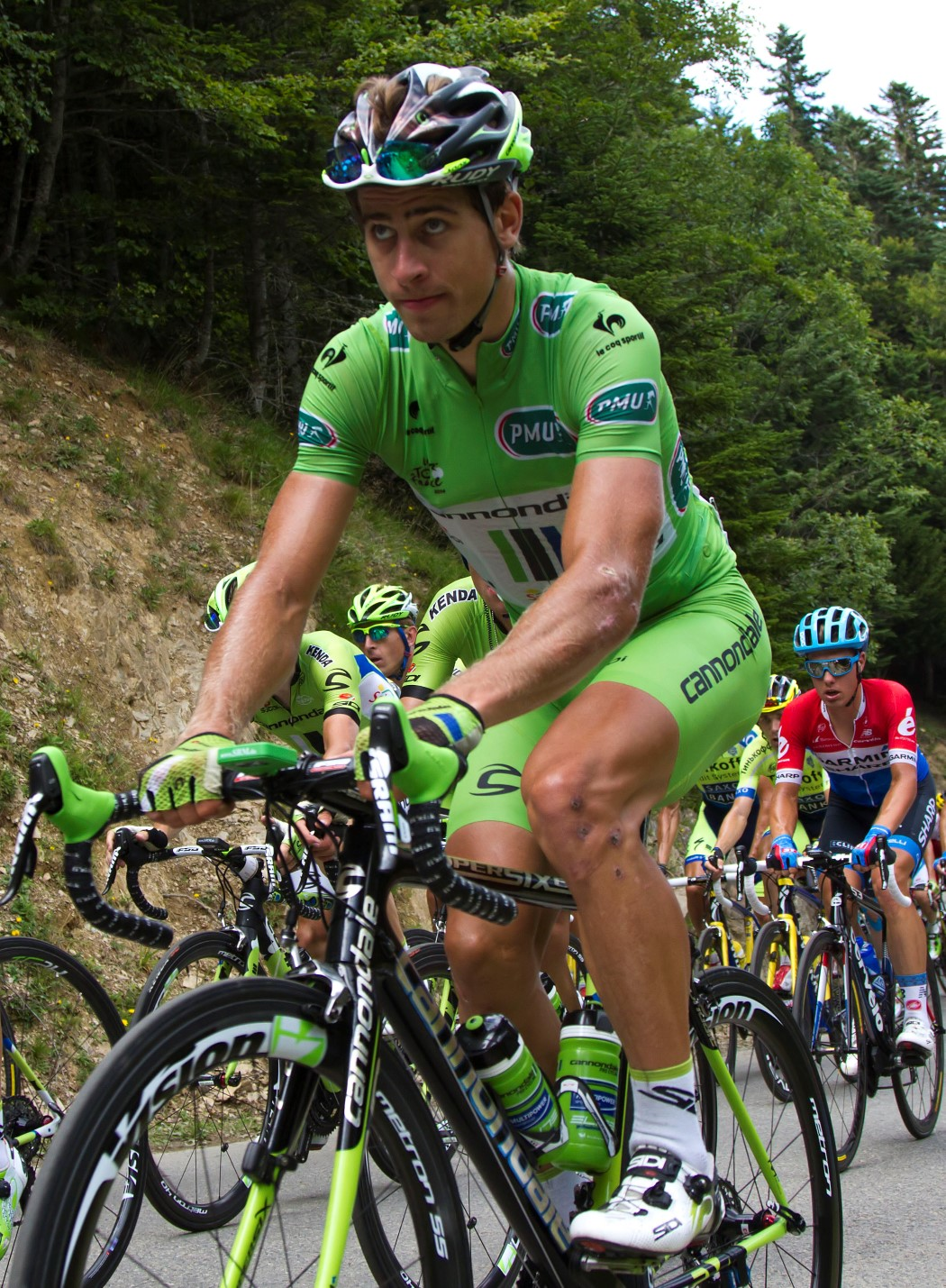 175 sagan